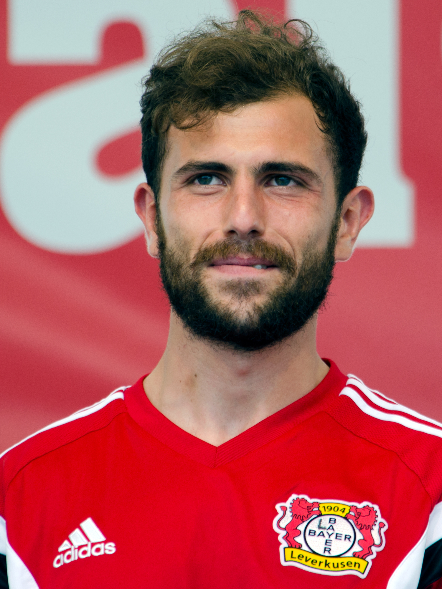 Admir Mehmedi, Schweizer Fussballspieler